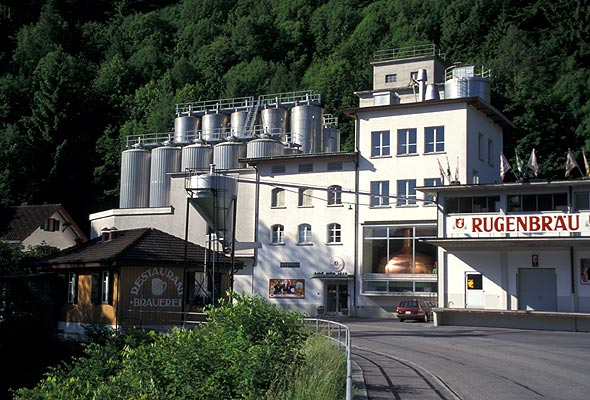 Das Brauereigebäude der Firma Rugenbräu in Matten bei Interlaken